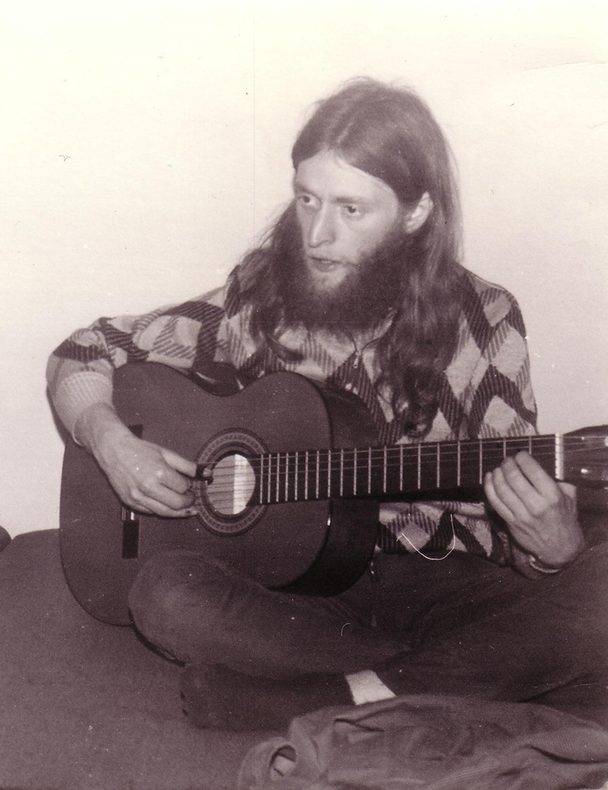 Historisches Foto von Karl-Heinz Bomberg